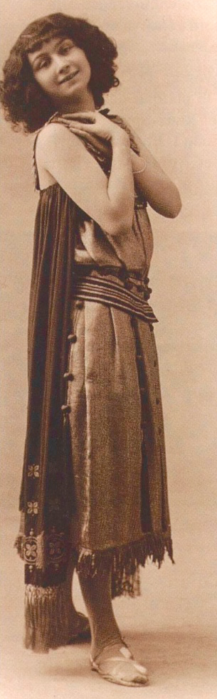 Suzette Guillaud (1894-1990), en costume de théâtre.